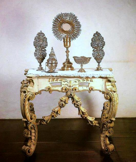 Credência de altar, século XVIII. Madeira policromada e dourada. 90 x 90 x 60 cm. Acervo do Museu de Arte Sacra de São Paulo.